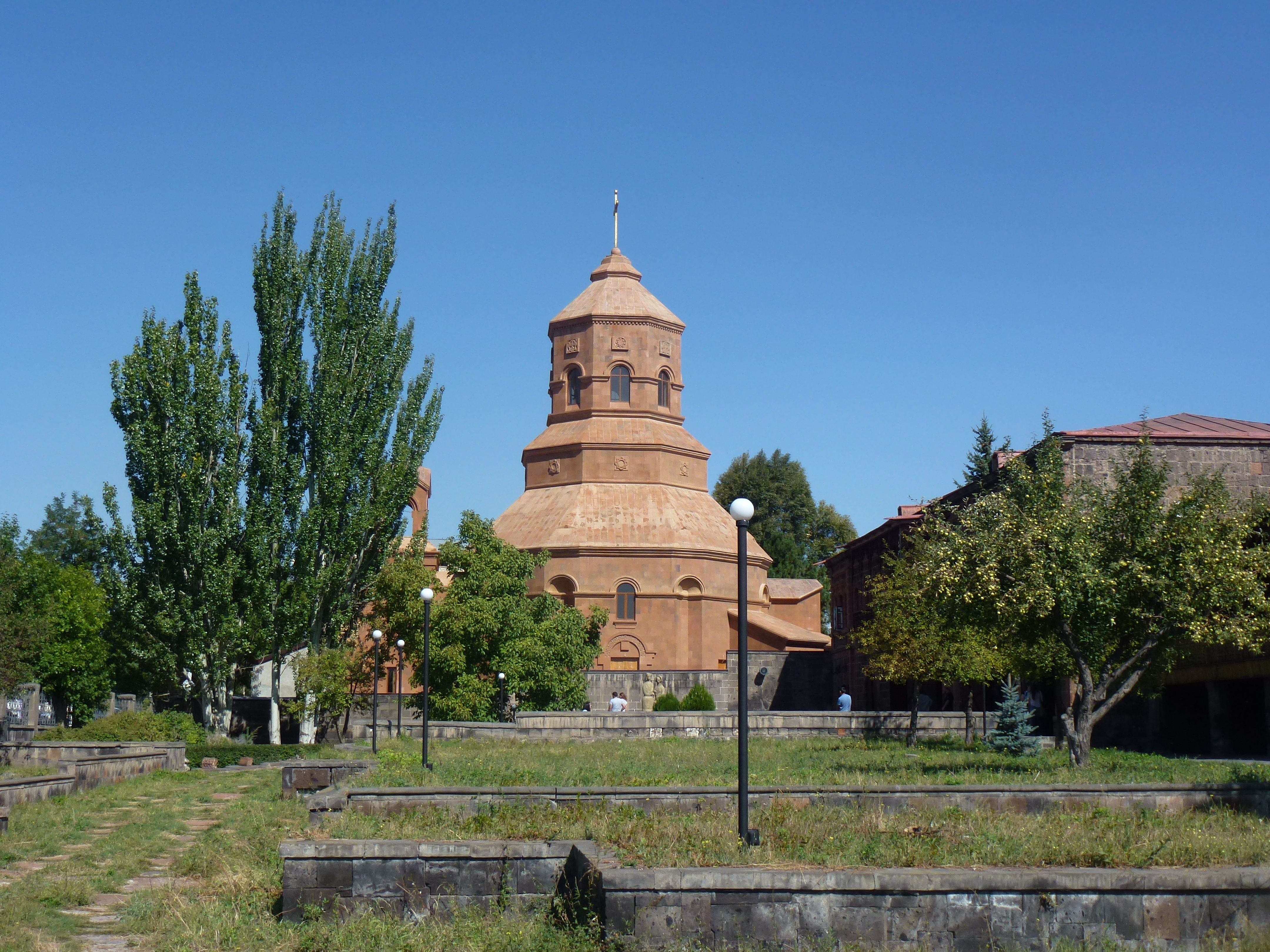 Սուրբ Խաչ (Գյումրի) 1/4